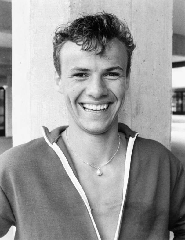 Harald Nielsen